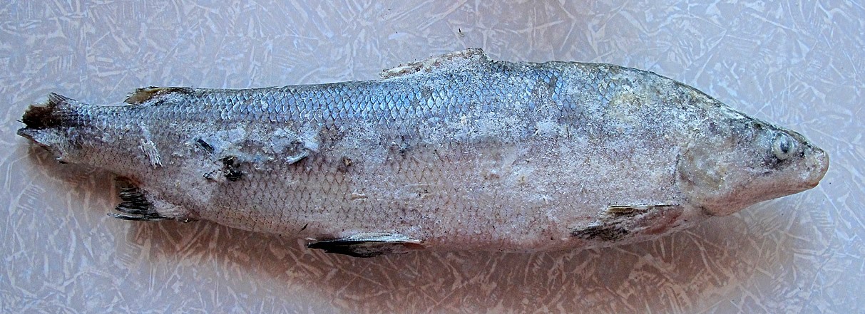 Муксун мороженый